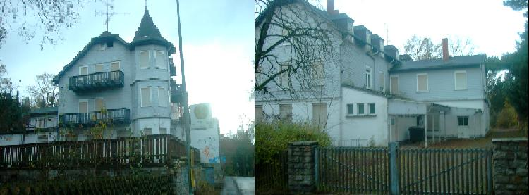 Taunusheim